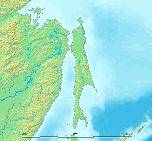 Sakhalin